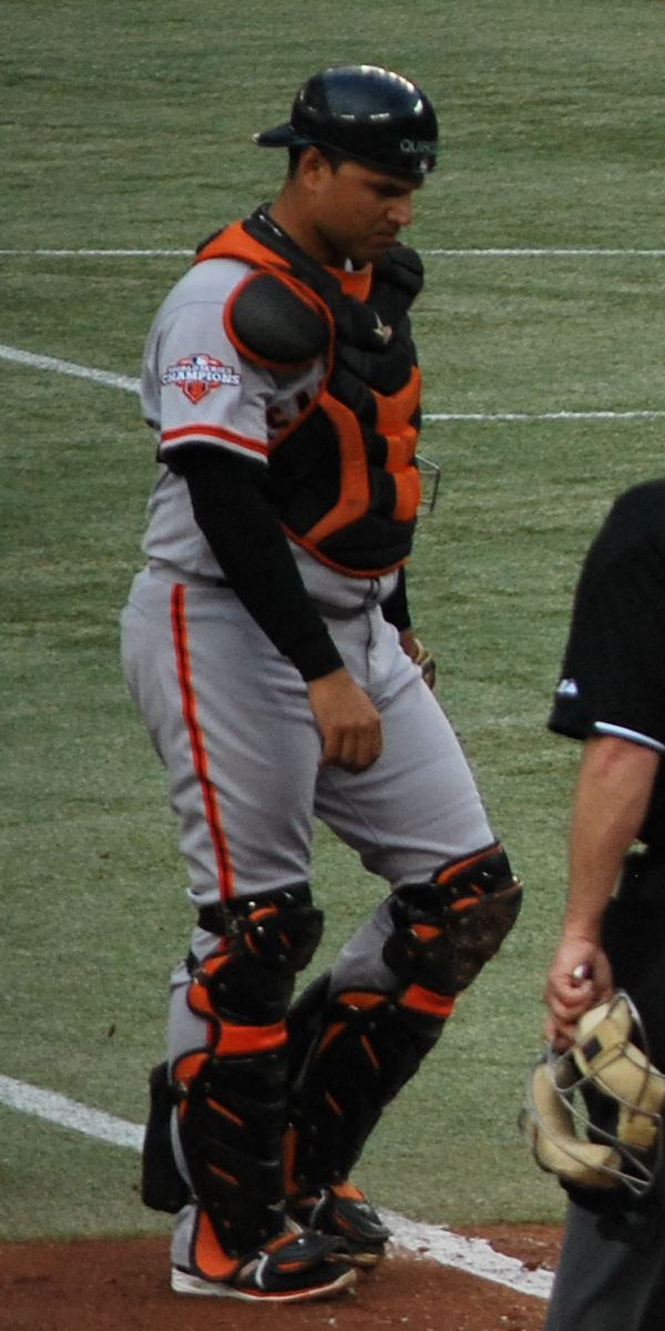 Guillermo Quiróz